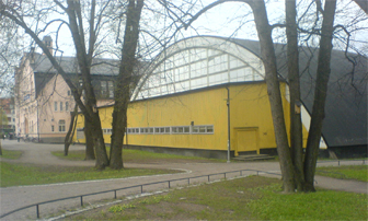 Studenternas tennispaviljong. "Bollhuset" 2007; i bakgrunden syns Svettis.